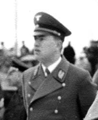 Title: Kitzbühel, großdeutsche alpine Skimeisterschaft Extra information: Ehrengäste u.a. Dr. Wilhelm Frick (mit Schlägerkappe), Franz Hofer (l.neben Frick), Gauleiter der NSDAP im Gau Tirol- Vorarlberg und Reichsstatthalter für Tirol- Vorarlberg People in the image: Frick, Wilhelm Dr.: NSDAP, MdR, Reichsinnenminister, 1946 hingerichtet, Deutschland * Hofer, Franz: Gauleiter der NSDAP in Tirol-Vorarlberg, Österreich Factual corrections and alternative descriptions are encouraged separately from the original description. Additionally errors can be reported at this page to inform the Bundesarchiv. Original historic description: Skimeisterschaften Kitzbühel 1939 Ehrengäste ...